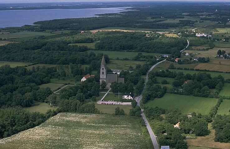 Öja kyrka Motiv: Öja Nyckelord: Flygbilder, Riksintressen Kategori: KyrkomiljöÖja kyrka.